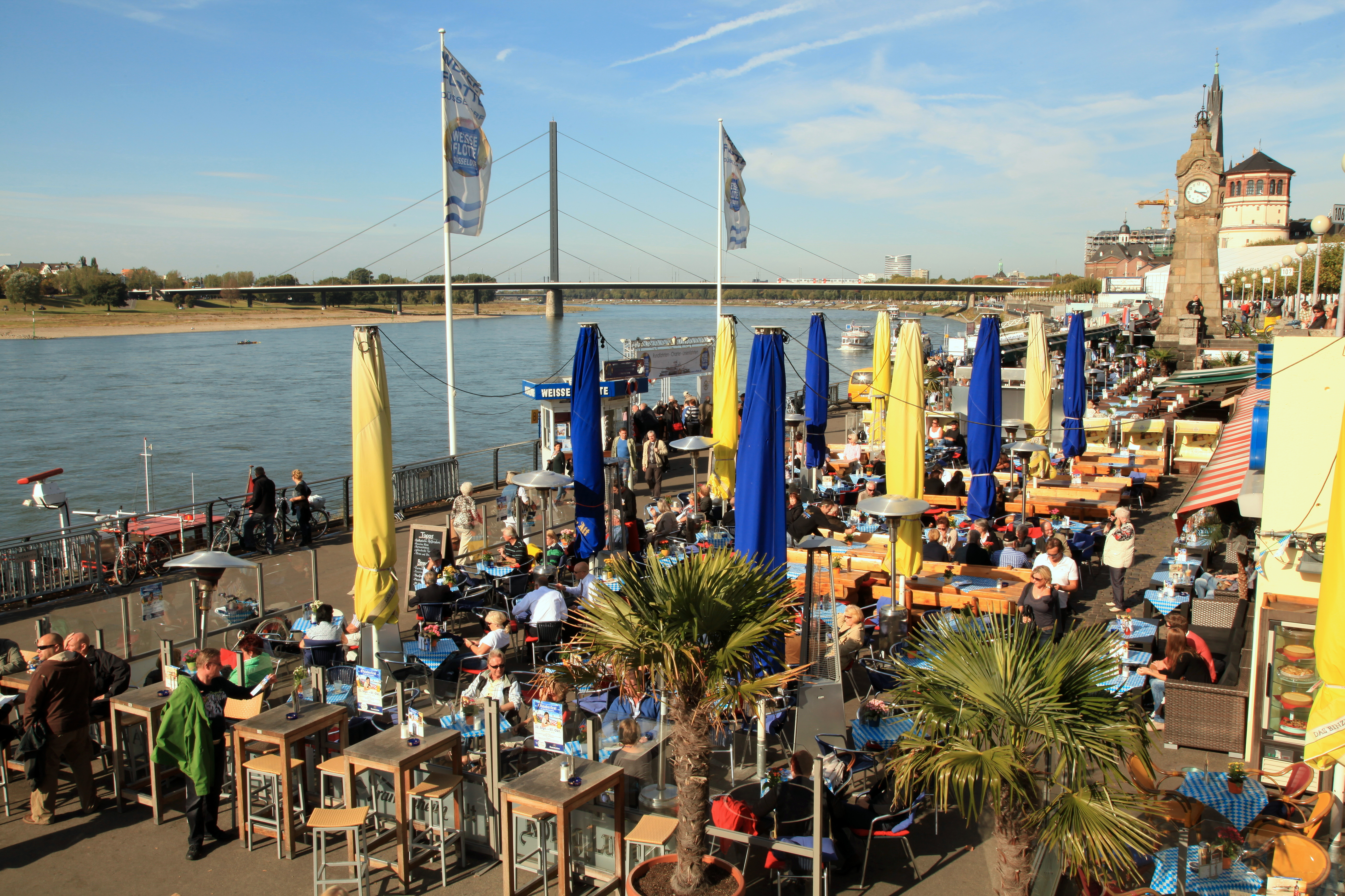 Unteres Rheinwerft und Oberkasseler Brücke in Düsseldorf